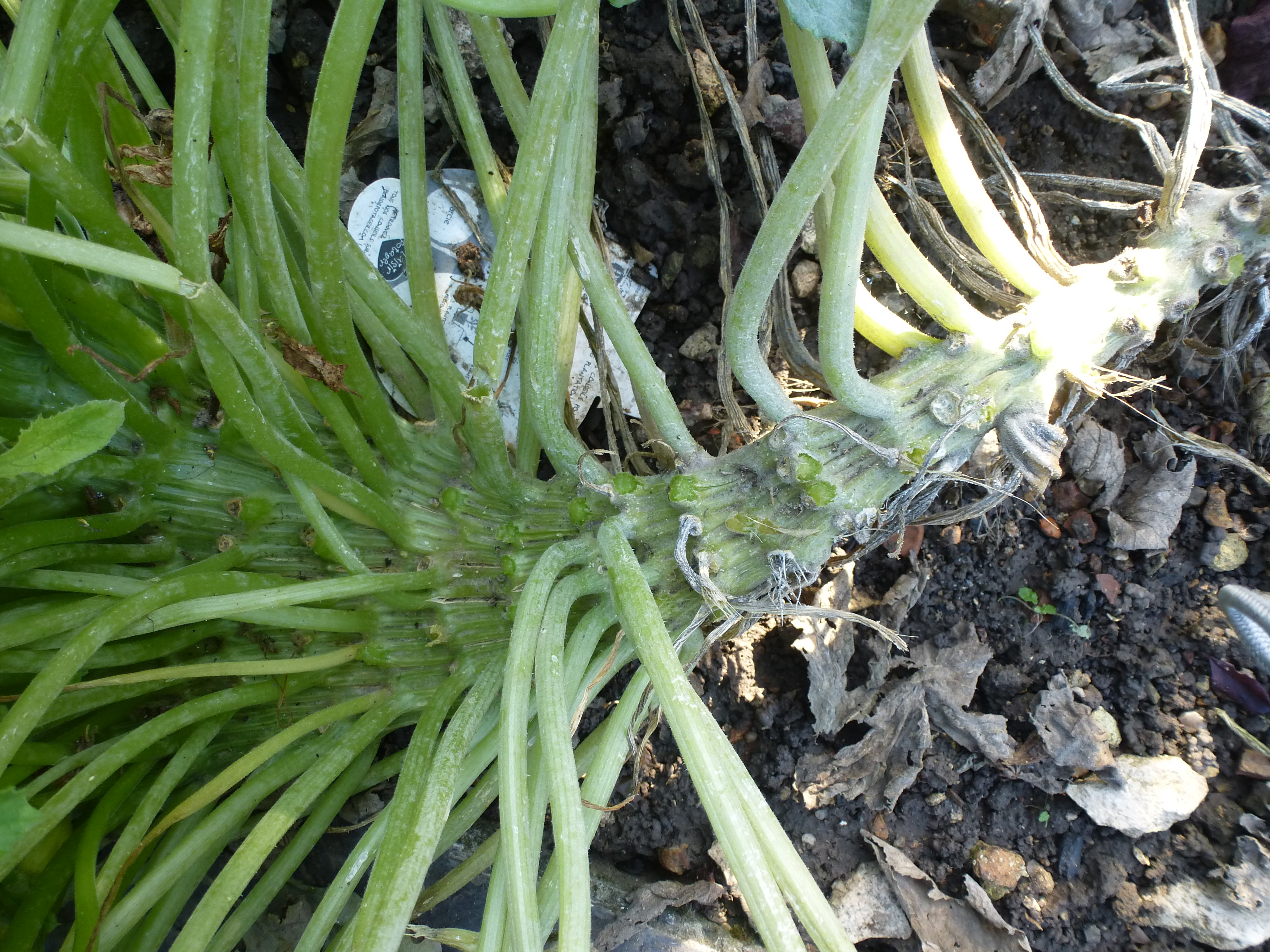 Courgette ronde de nice (Cucurbita pepo 'De Nice à Fruit Rond') fasciée. Plante cultivée à partir d'un plan vendu en godet. Potager dans les Yvelines (78), France, Europe.